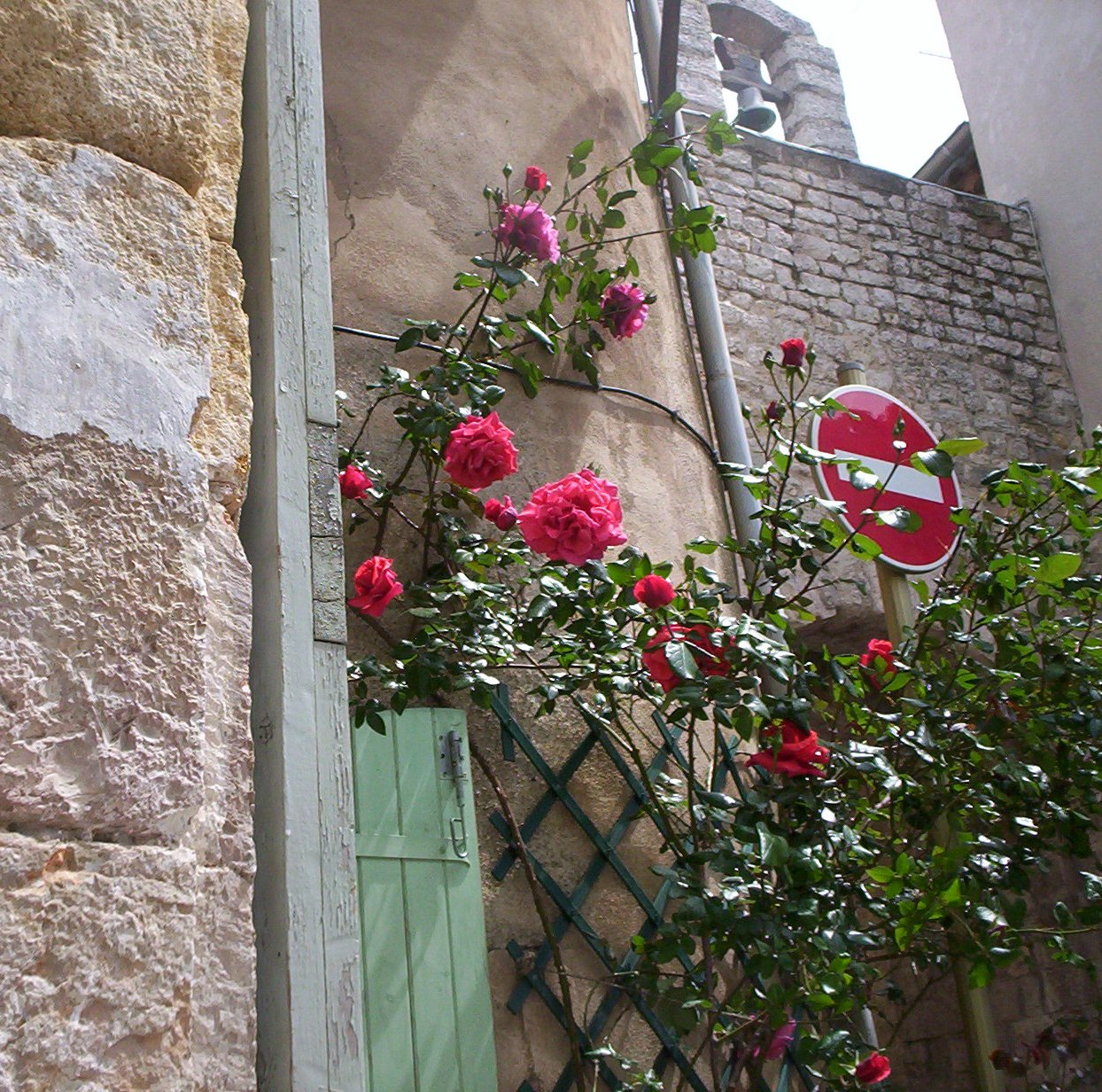 immagine della porta di Saint Jean, comune di Rians, 83560, Francia